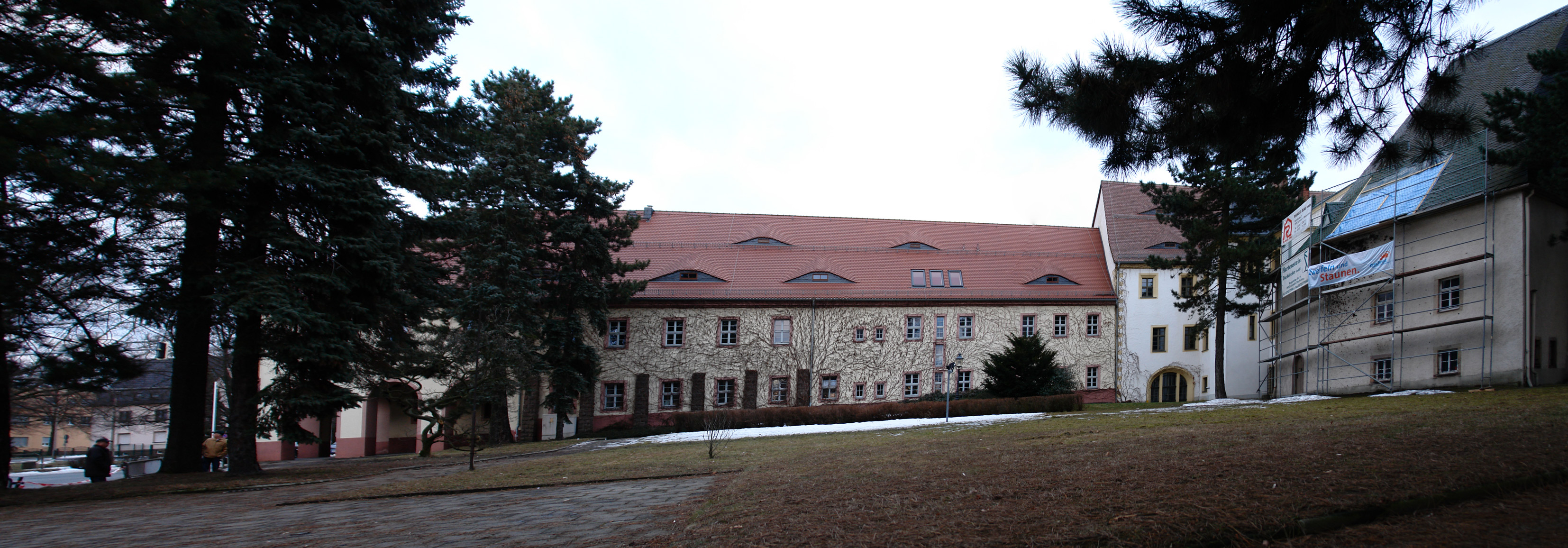 Flugbahn von Links (Absperrung) nach rechts